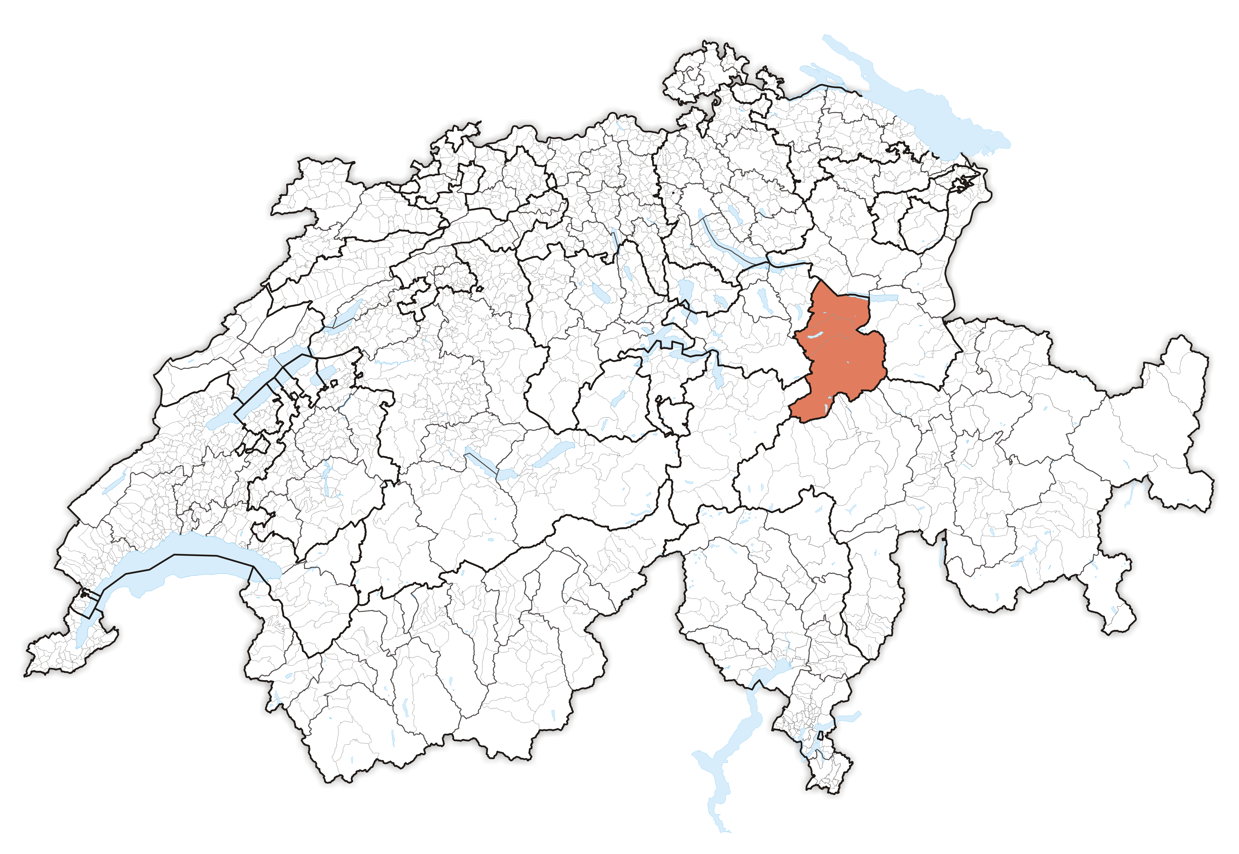 Canton Glarus